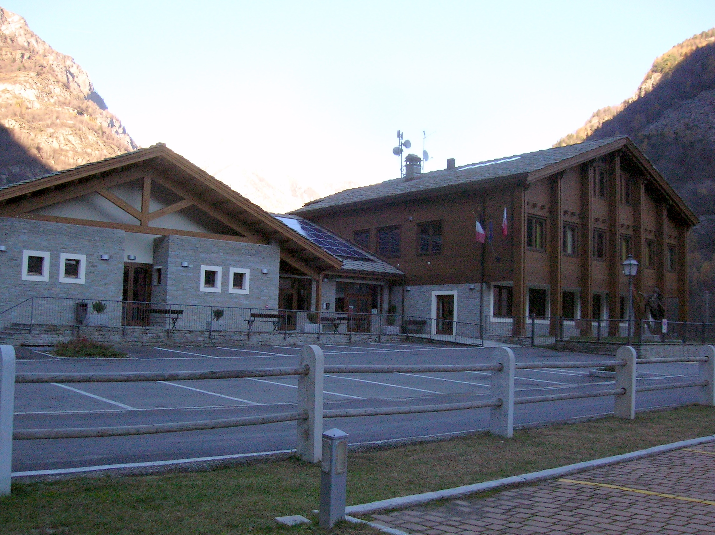 centro polivalente di Issime: scuola, refezione, biblioteca, palestra.